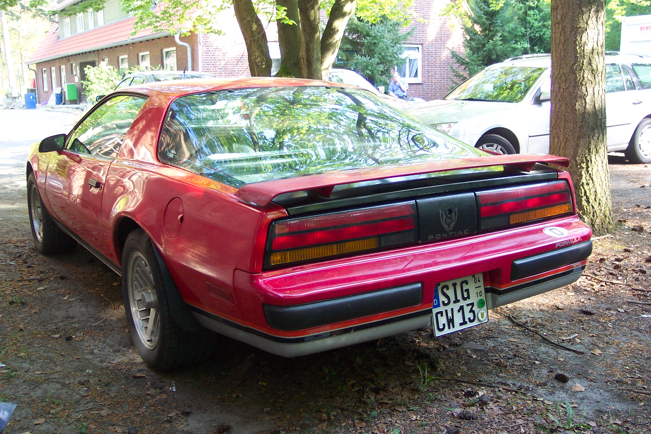 Pontiac Firebird Formula (1987-1992)